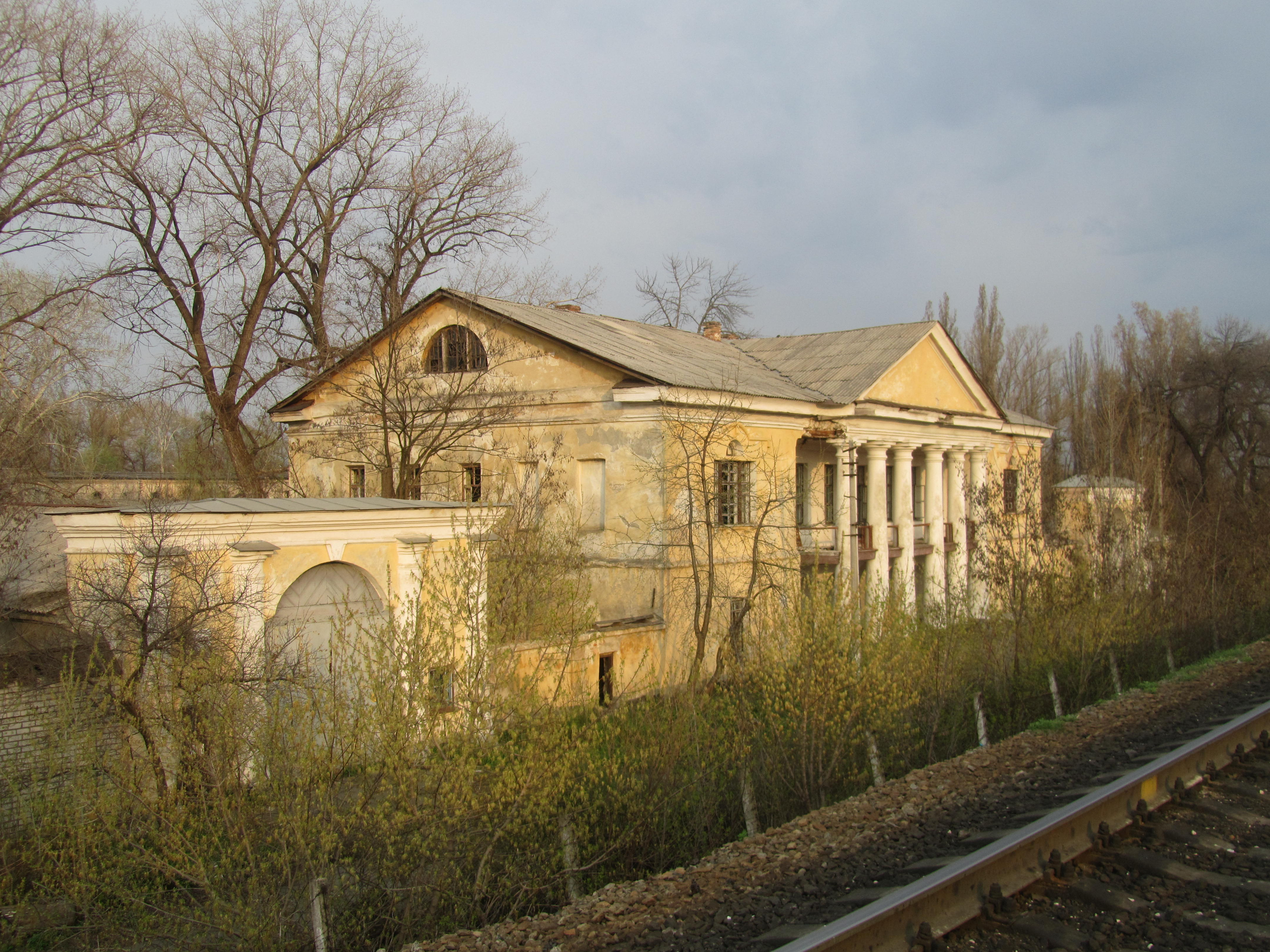 Кременчуцька комісаріатська комісія — Комплекс військових складів (5 будинків), Кременчук, Вул. Макаренка